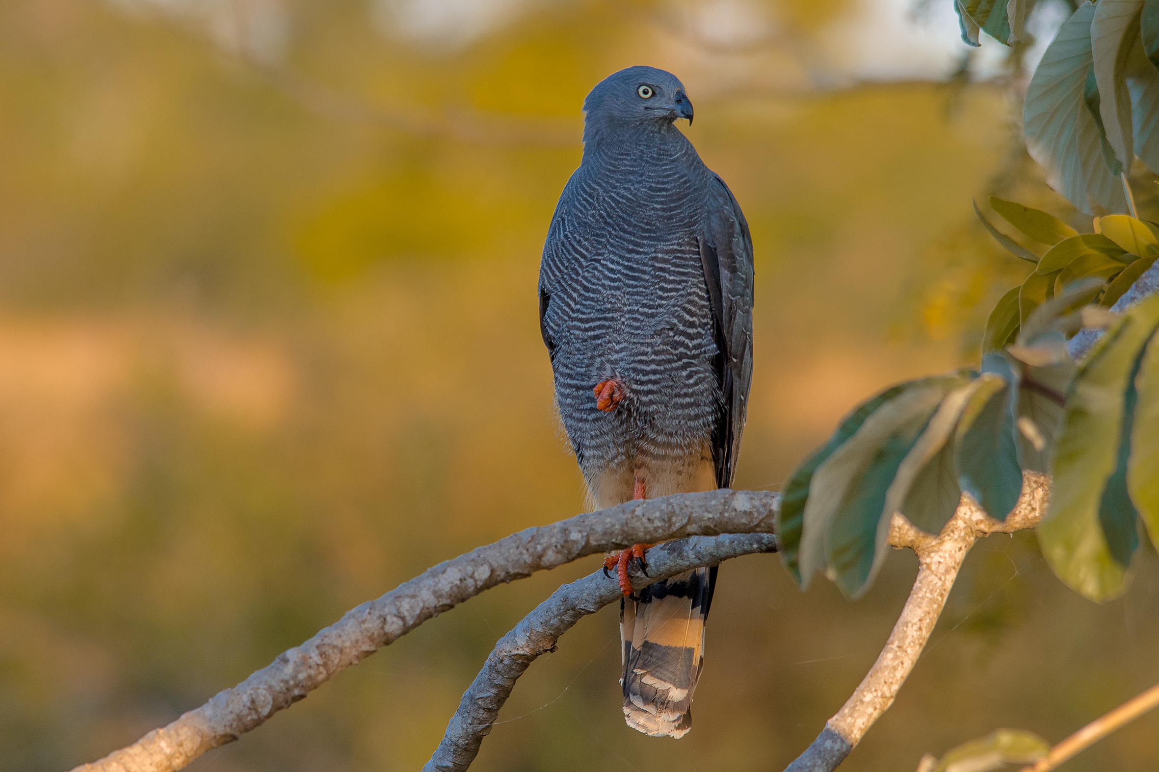 Ave descansa em uma Embaúbaǃ